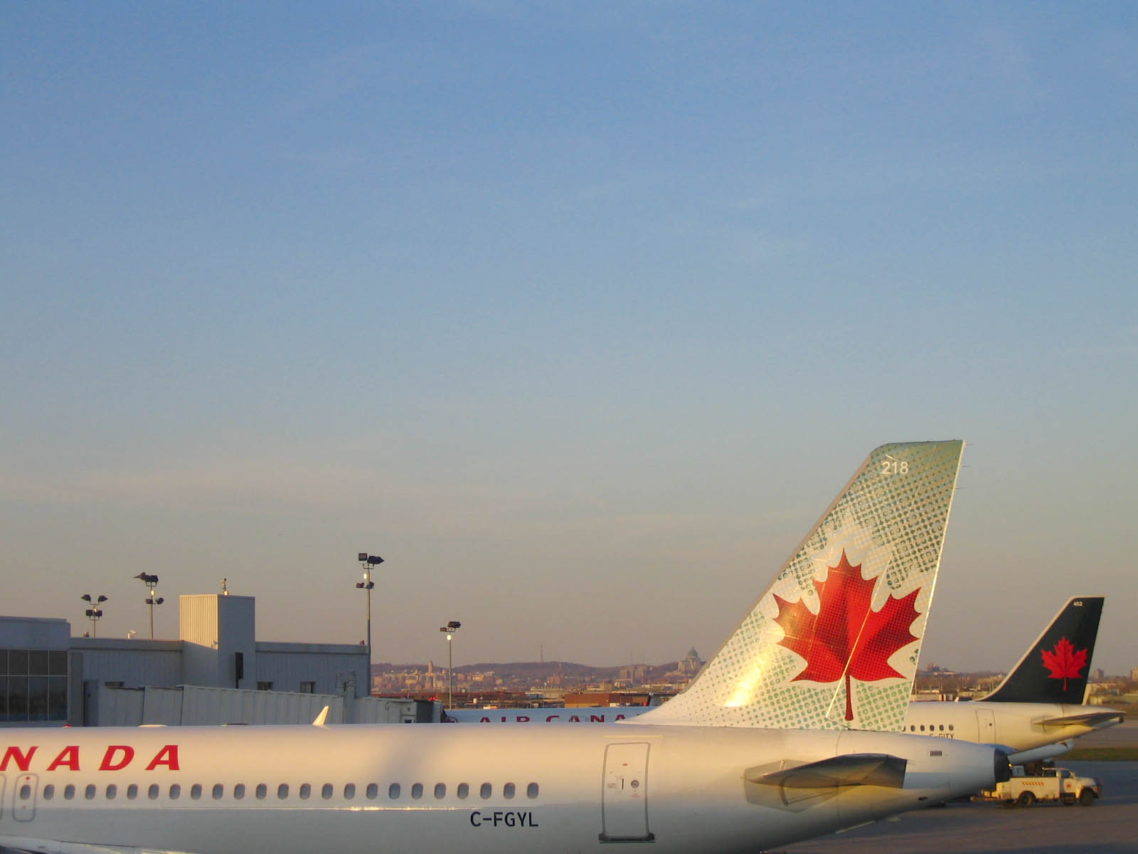 Avions d'Air Canada à l'Aéroport international Pierre-Elliott-Trudeau de Montréal